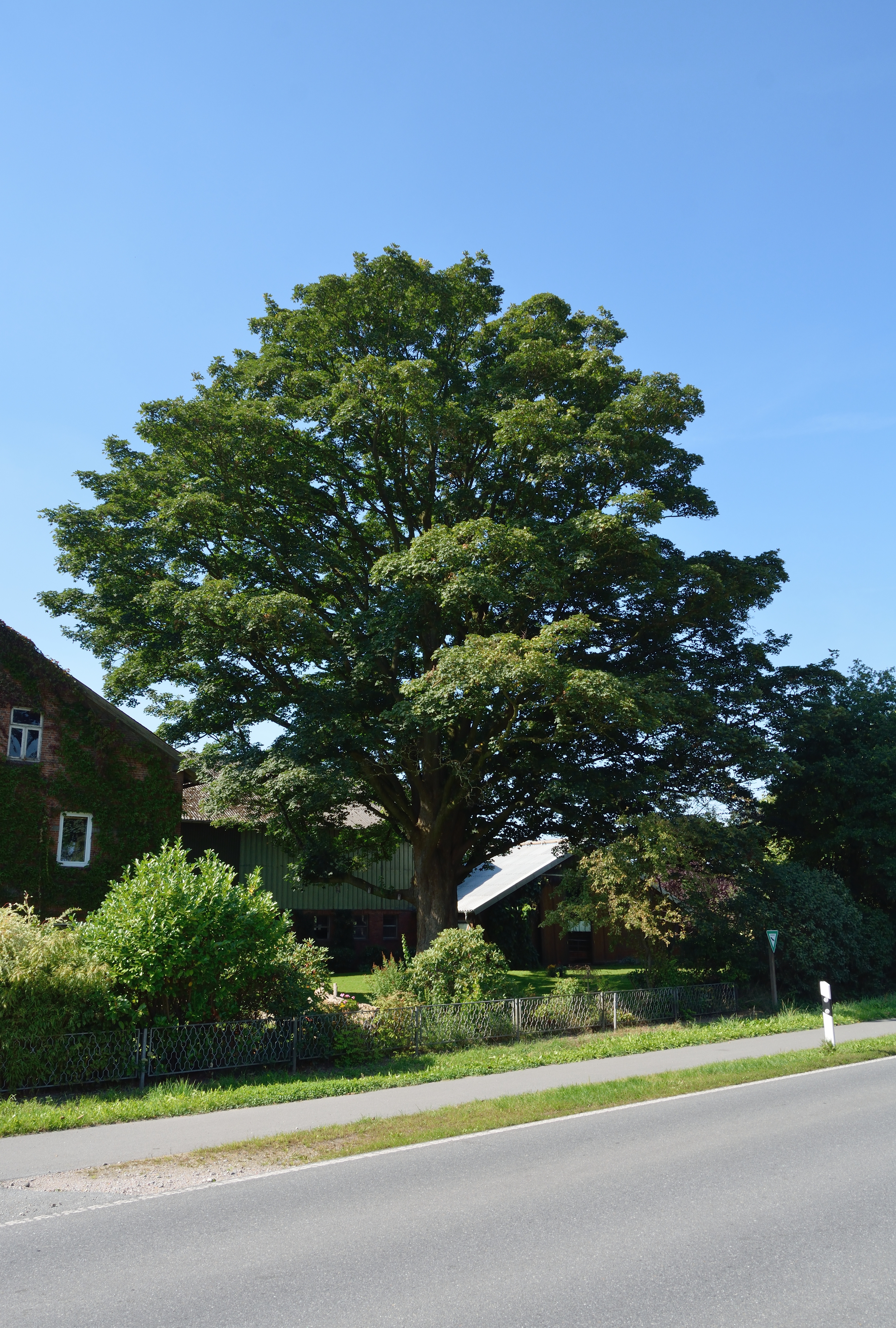 Naturdenkmal im Kreis Steinburg in Kaisborstel.